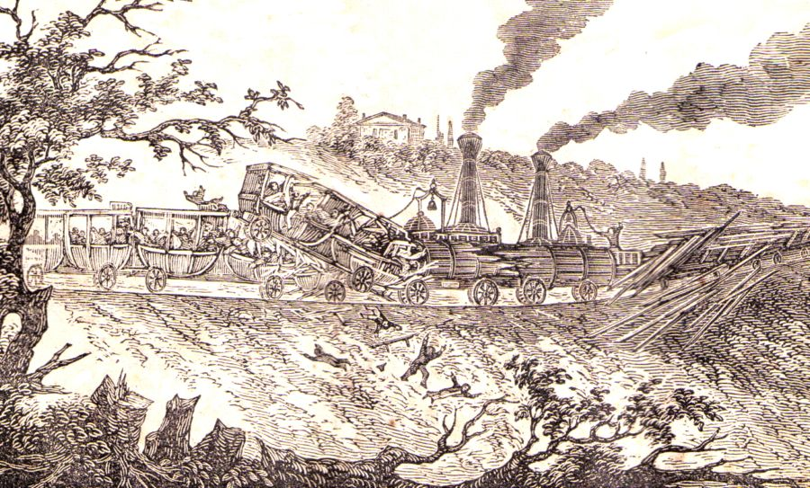 Suffolk accident